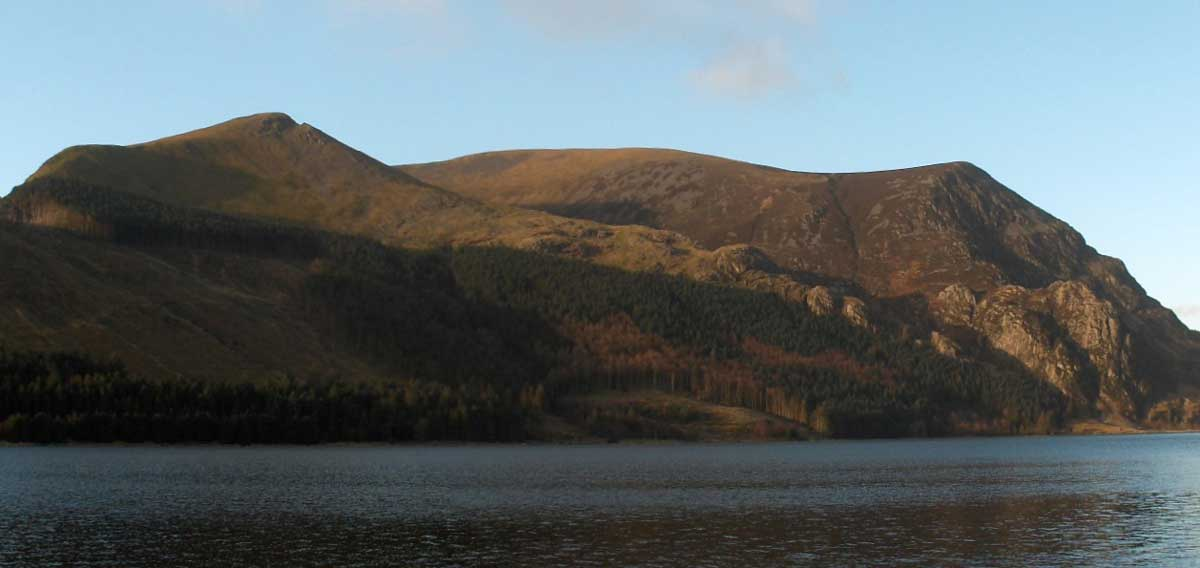 Mynydd Mawr and Llyn Cwellyn, seen from the Snowdon Ranger footpath